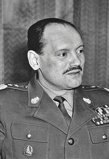 Grzegorz Korczyński, Communist general, partisan, d. in 1972